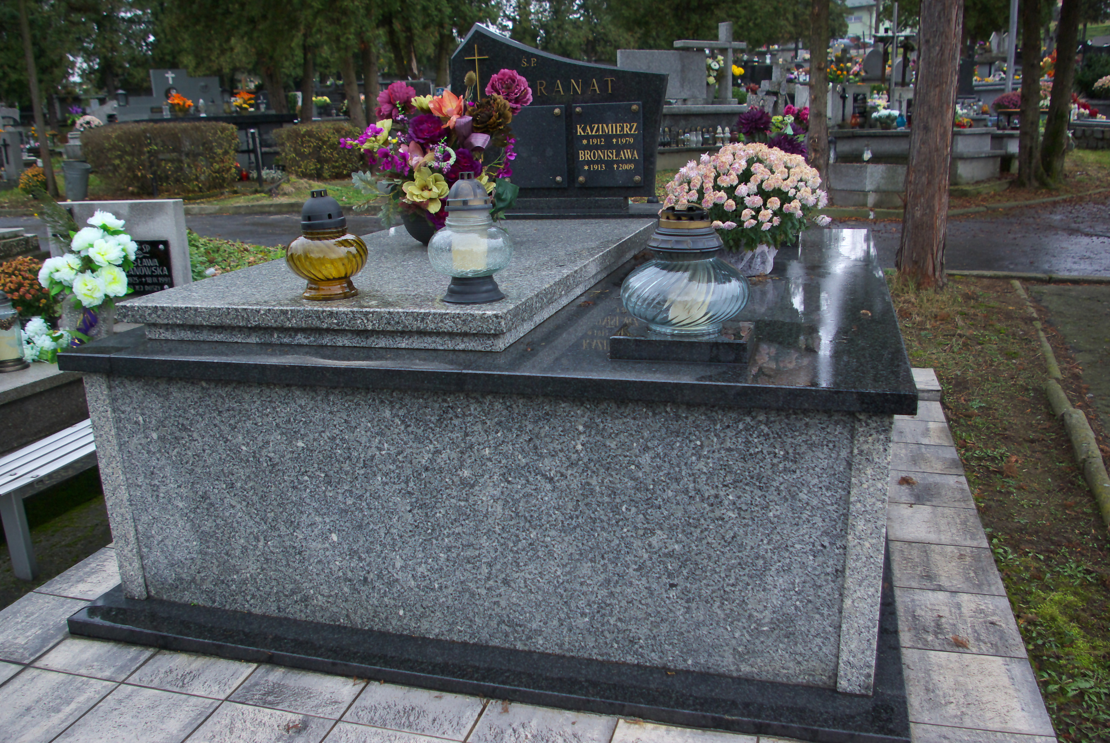 Grobowiec Bronisławy i Kazimierza Granat na Cmentarzu Centralnym w Sanoku